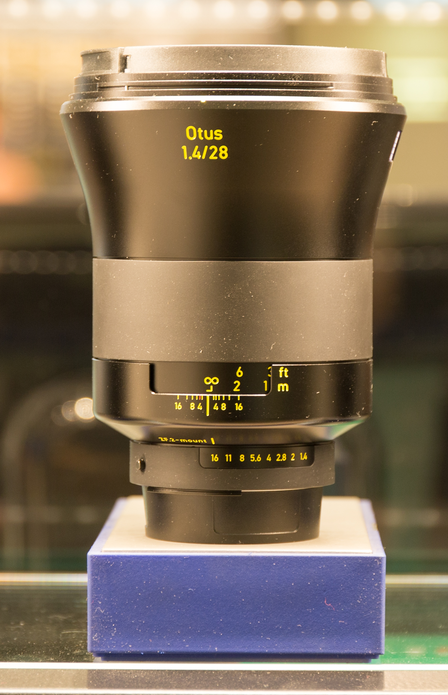 Zeiss Otus 28mm f1.4 Objektiv; Version mit Nikon F-Bajonett